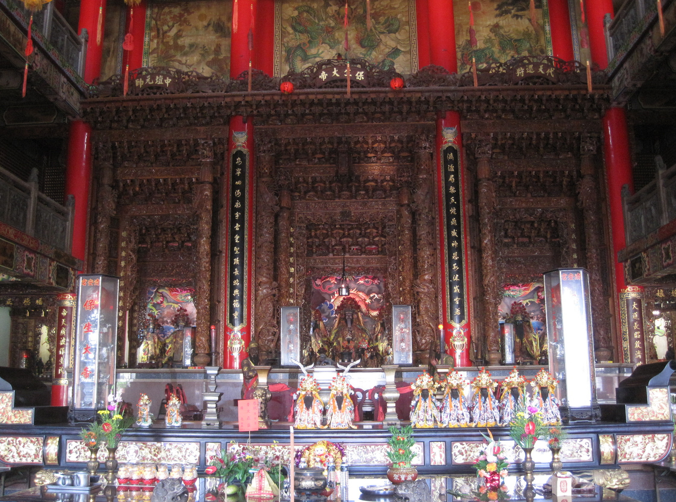 中文（台灣）: 新營濟安宮內部